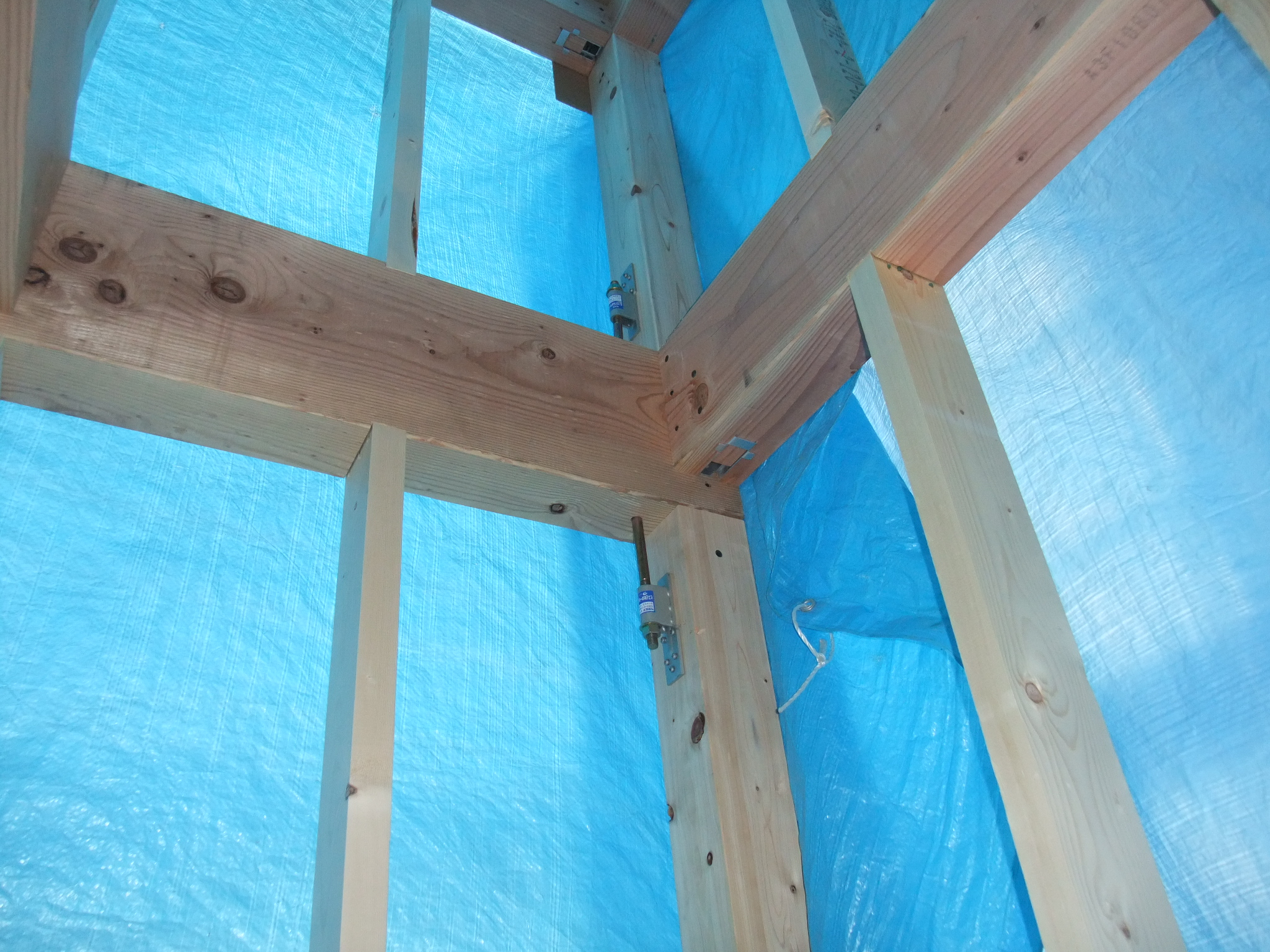 ドリフトピン工法。建物の角の仕様。基本的に梁が勝つ構造になるが、通し柱も存在する。柱はヒノキ無垢、梁は米松無垢。